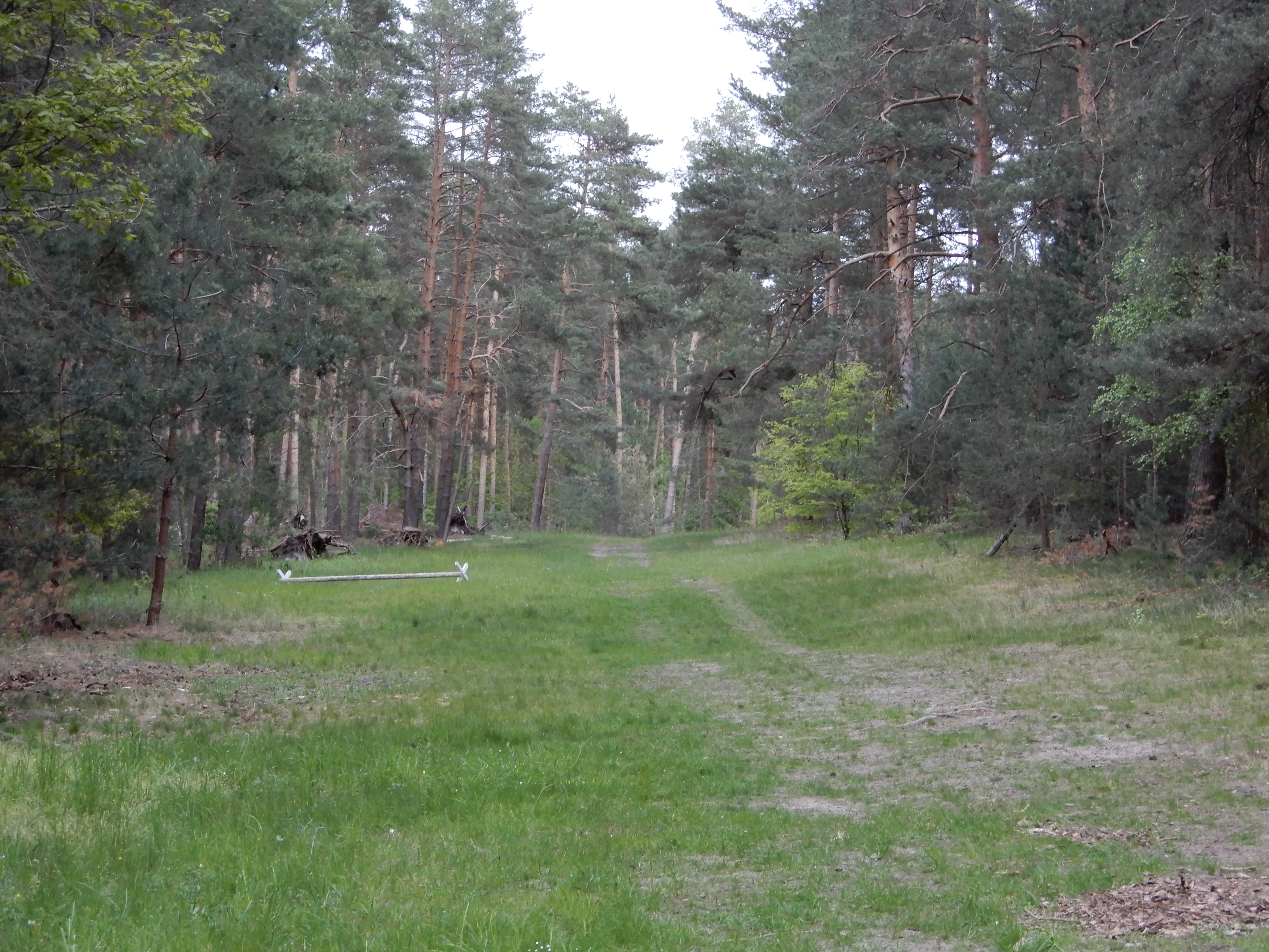 Rennbahn am Rennplatz Westerhausen